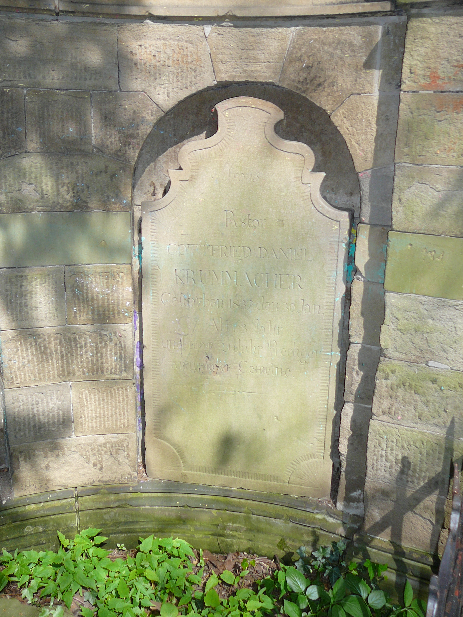 Else-Lasker-Schüler-Straße, Wuppertal